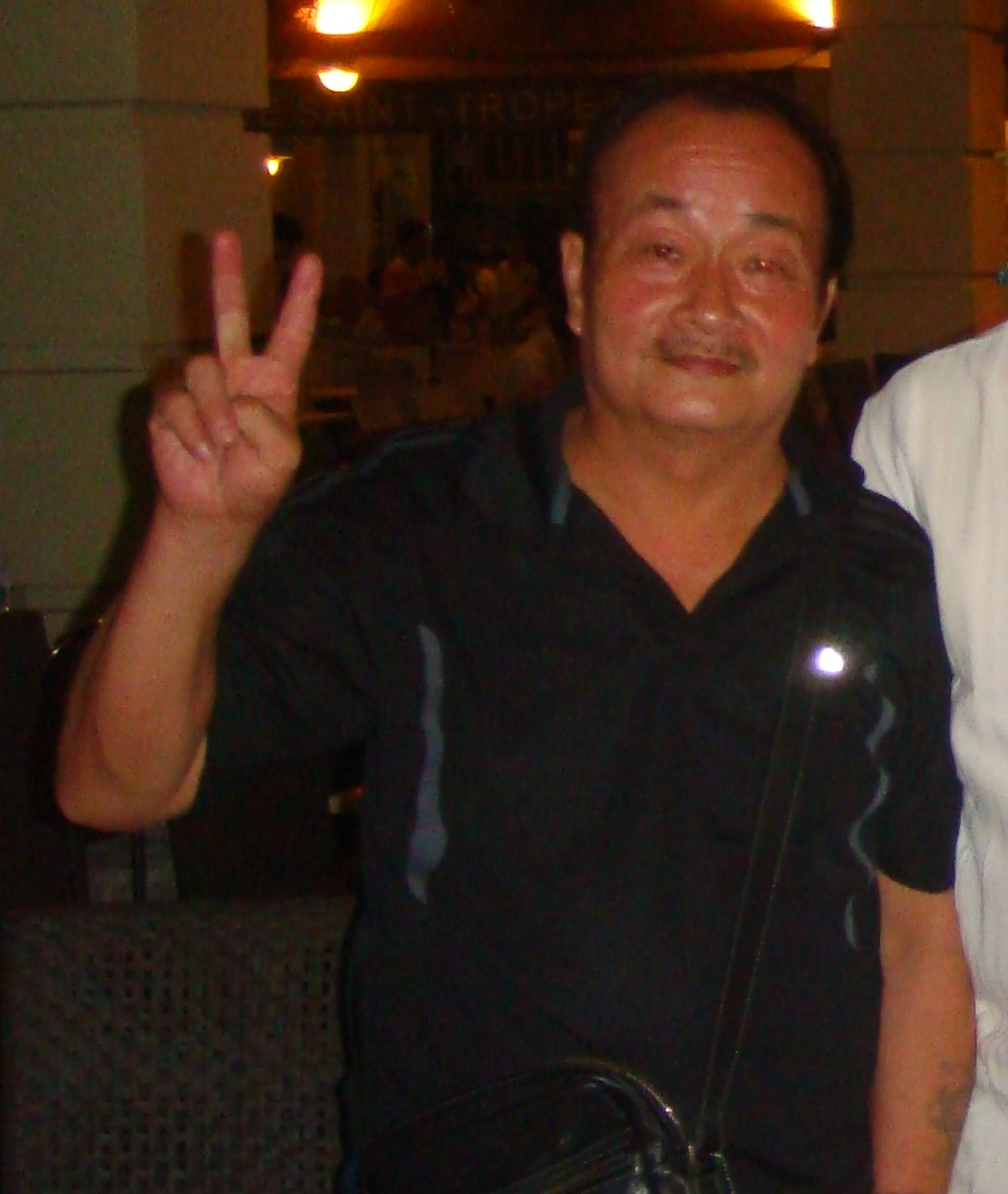 Võ sư Lê Công Ảnh chụp tại TP.HCM ngày 15 tháng 12 năm 2010.